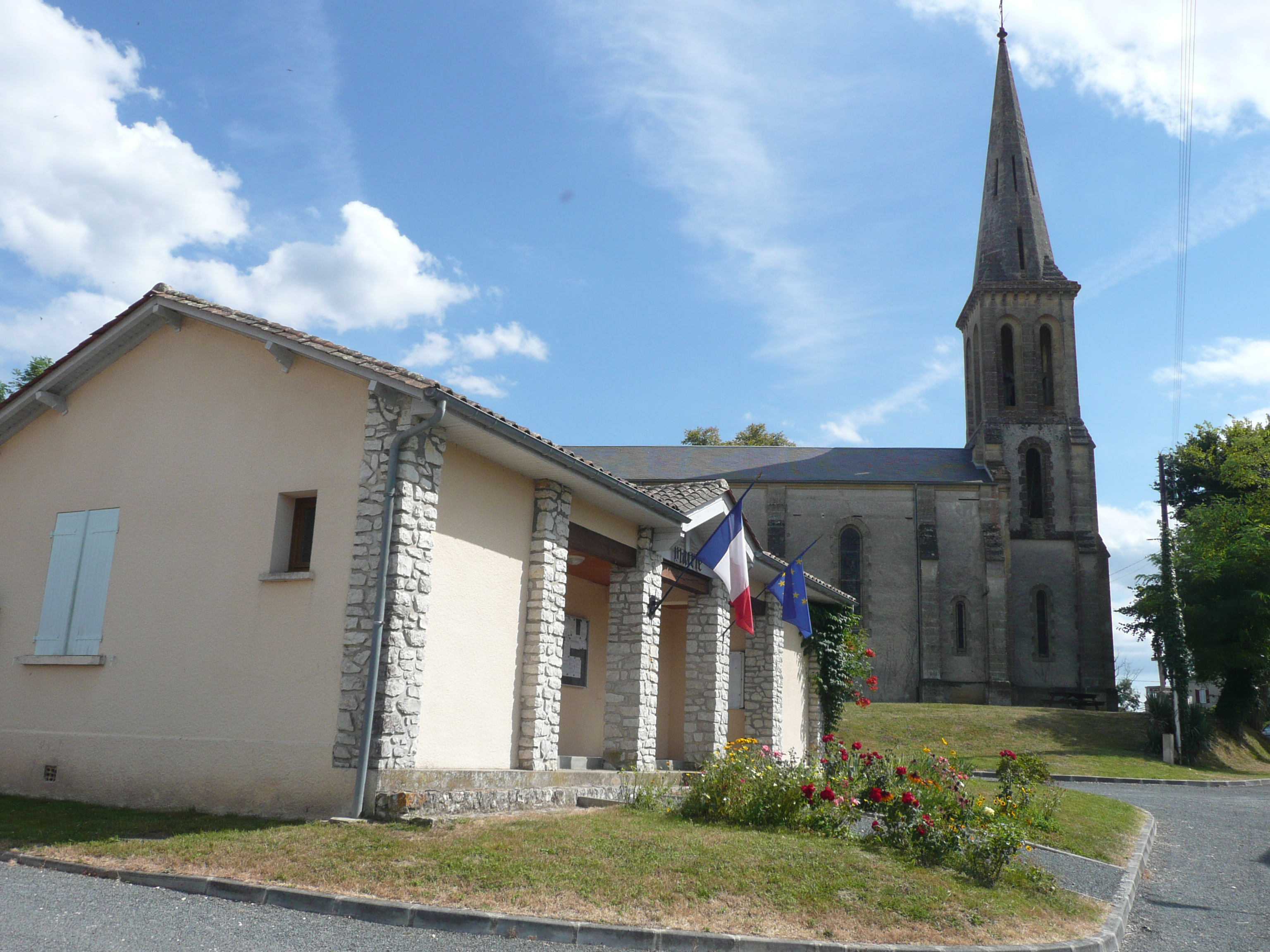 Bourg de Fraisse en Dordogne : la Mairie au premier plan et l'église derrière.